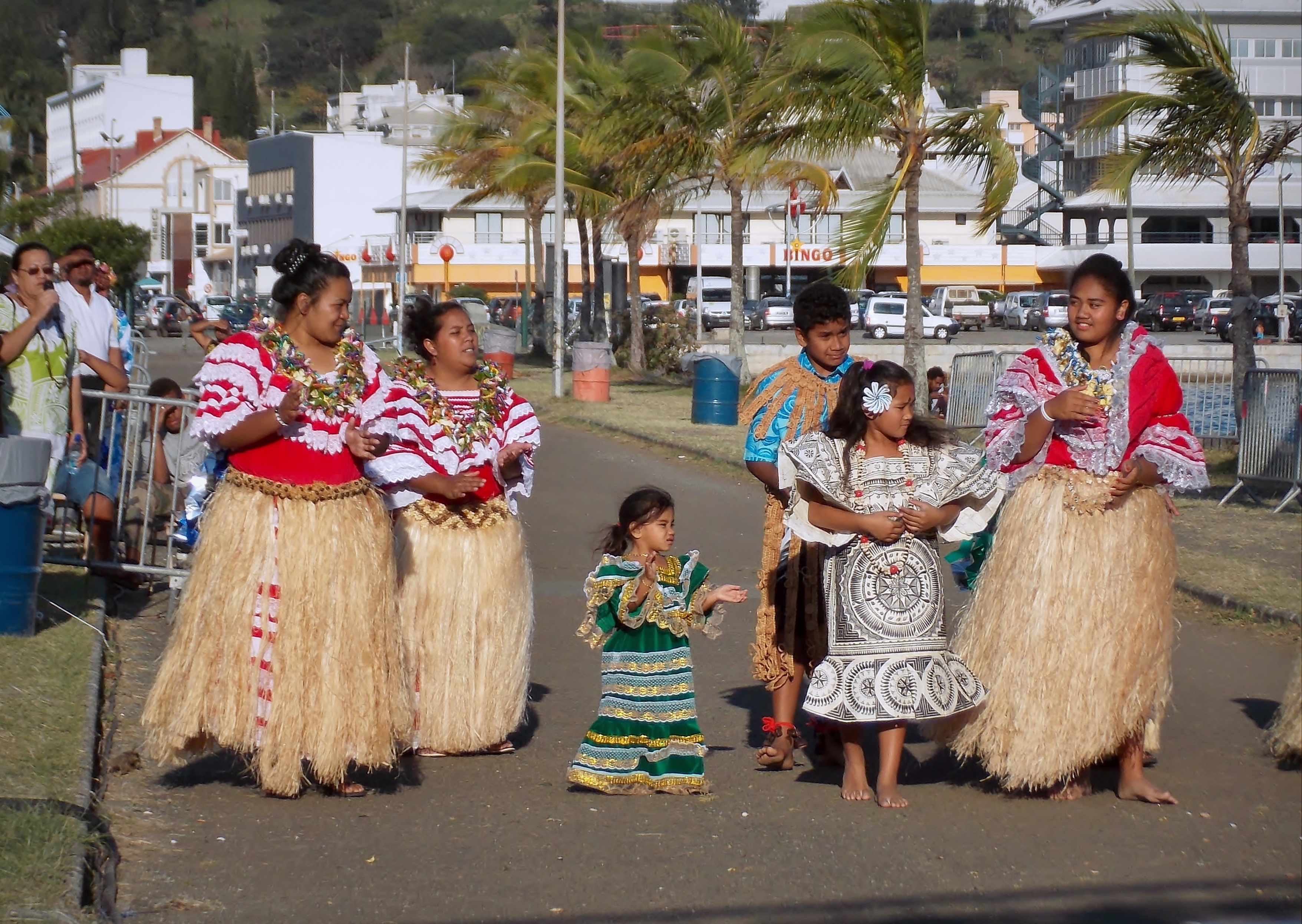 Wallisiens-Futuniens à Nouméa, Nouvelle-Calédonie, effectuant une danse